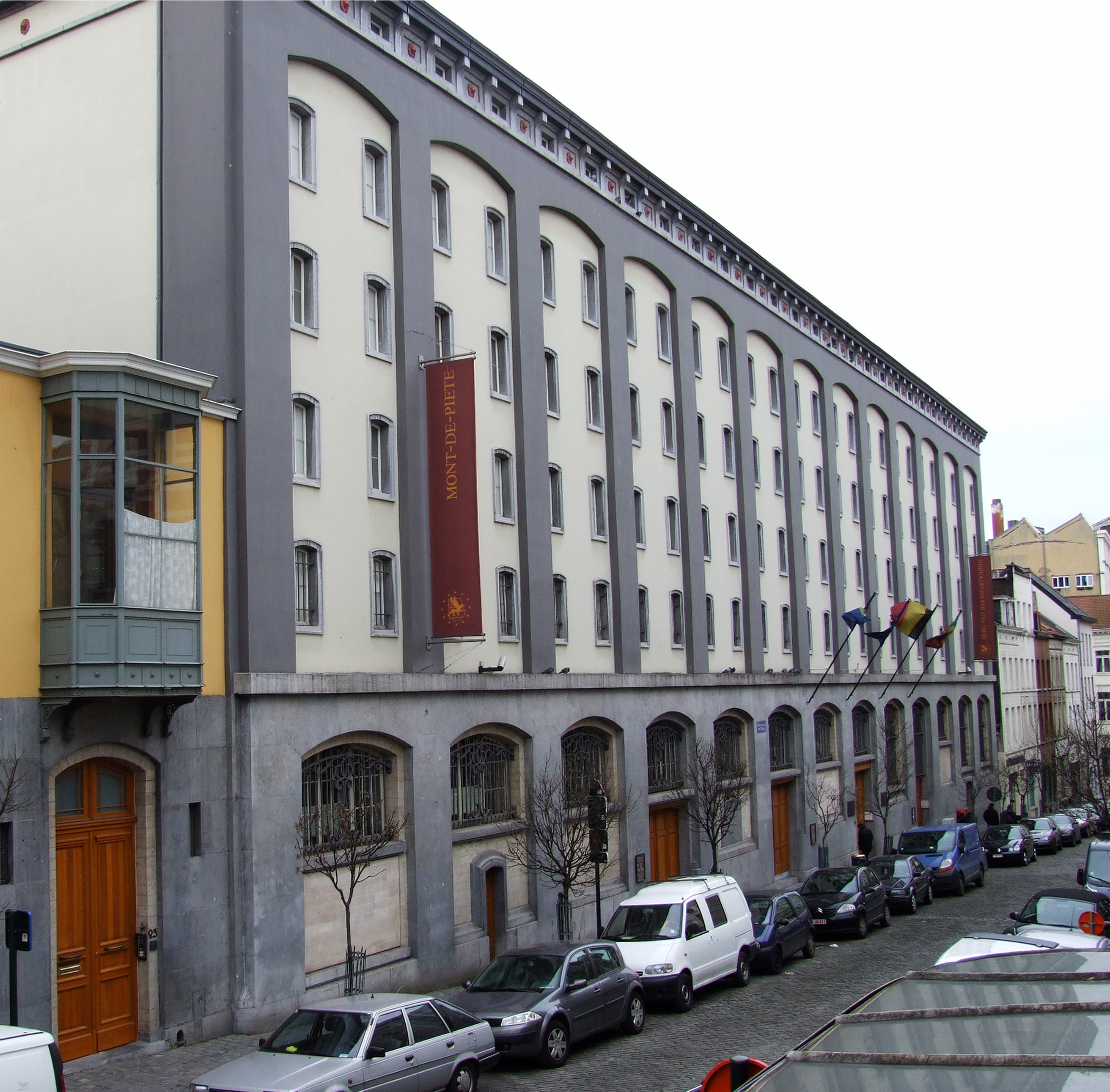 Mont de Piété Rue St Ghislain, Bruxelles